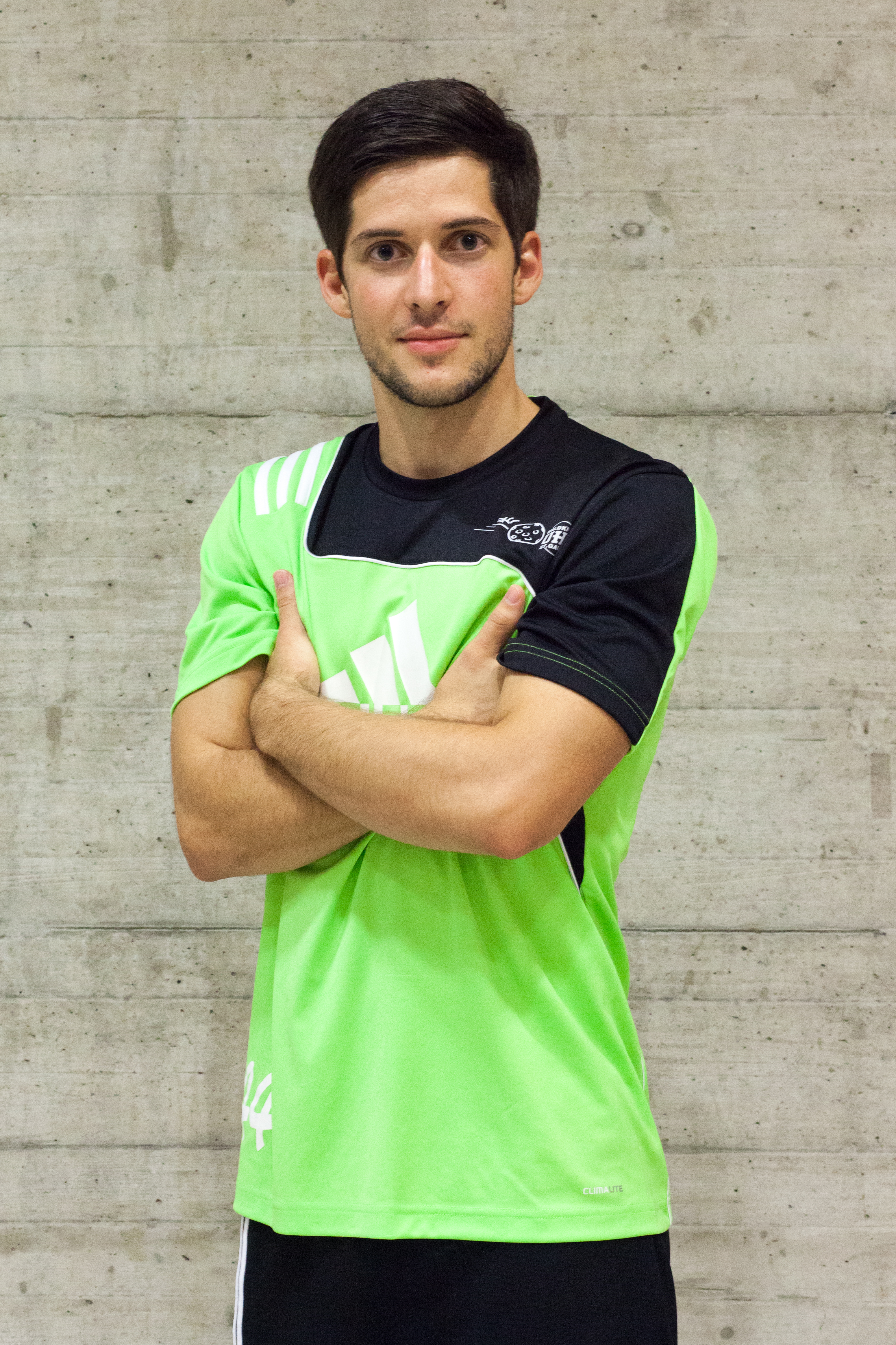 Thomas Mittelholzer